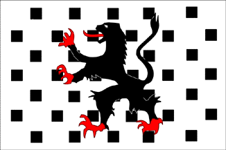 Chablais